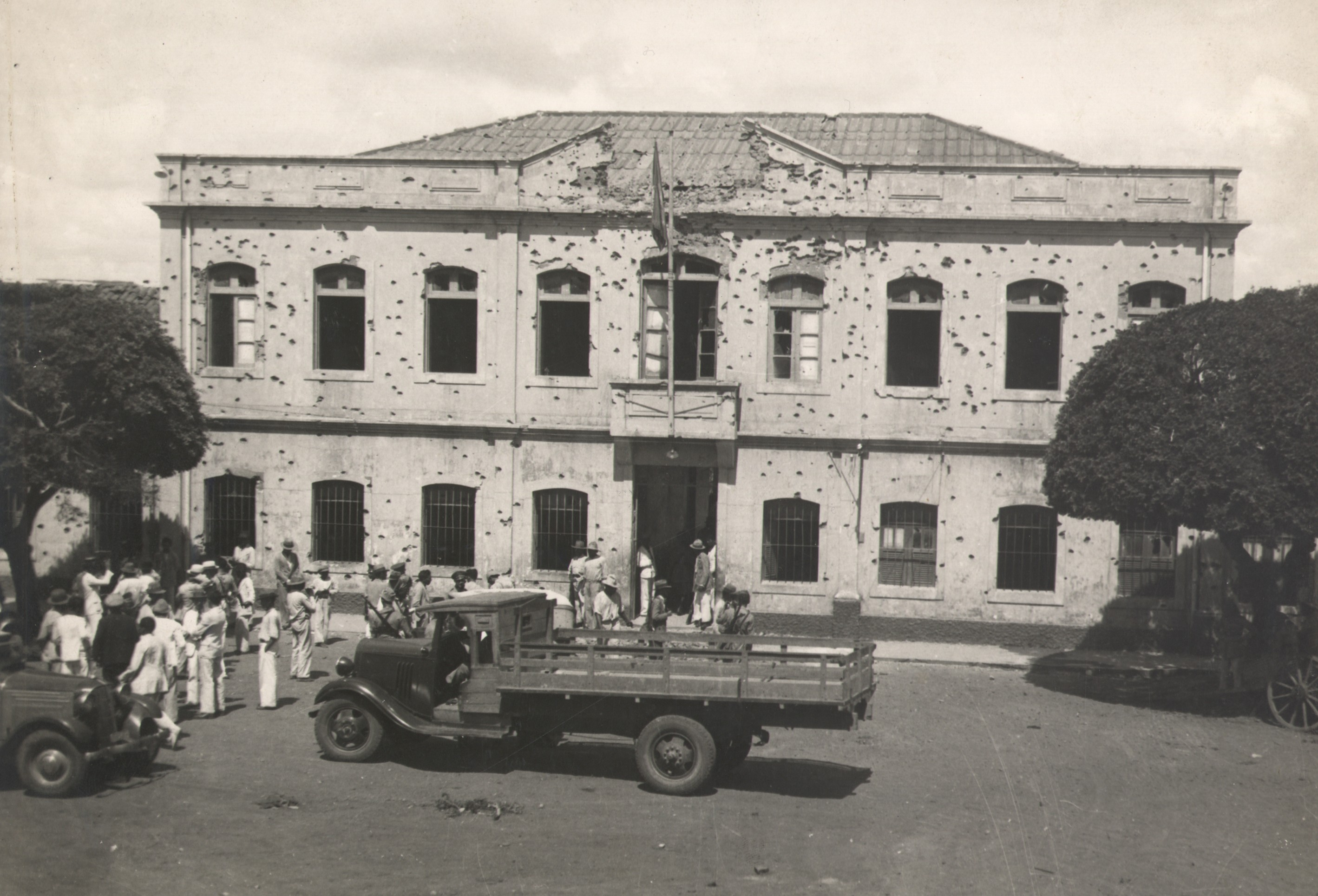 Imagem do Fundo Correio da Manhã.